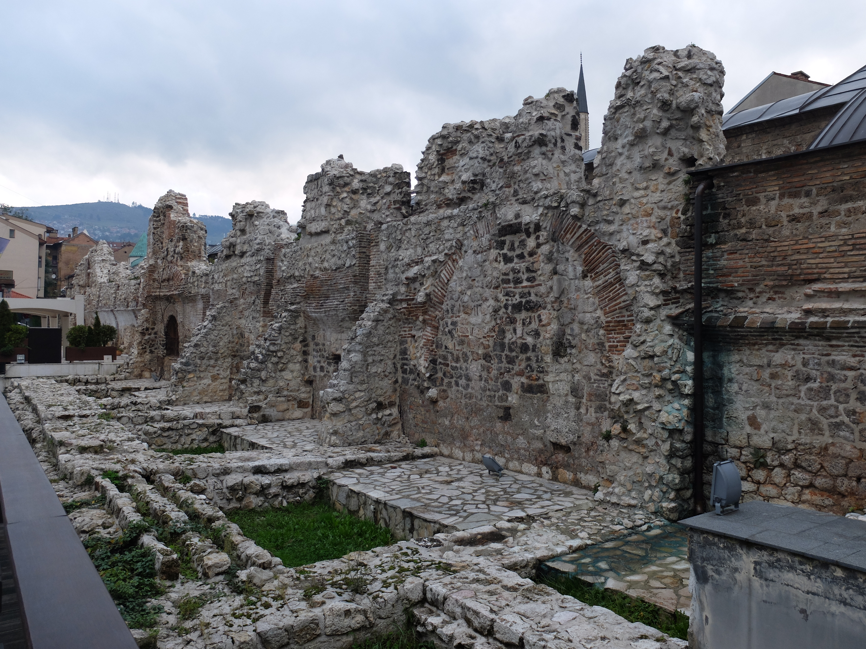 Sarajevo, Ausgrabung in der Altstadt (Baščaršija)